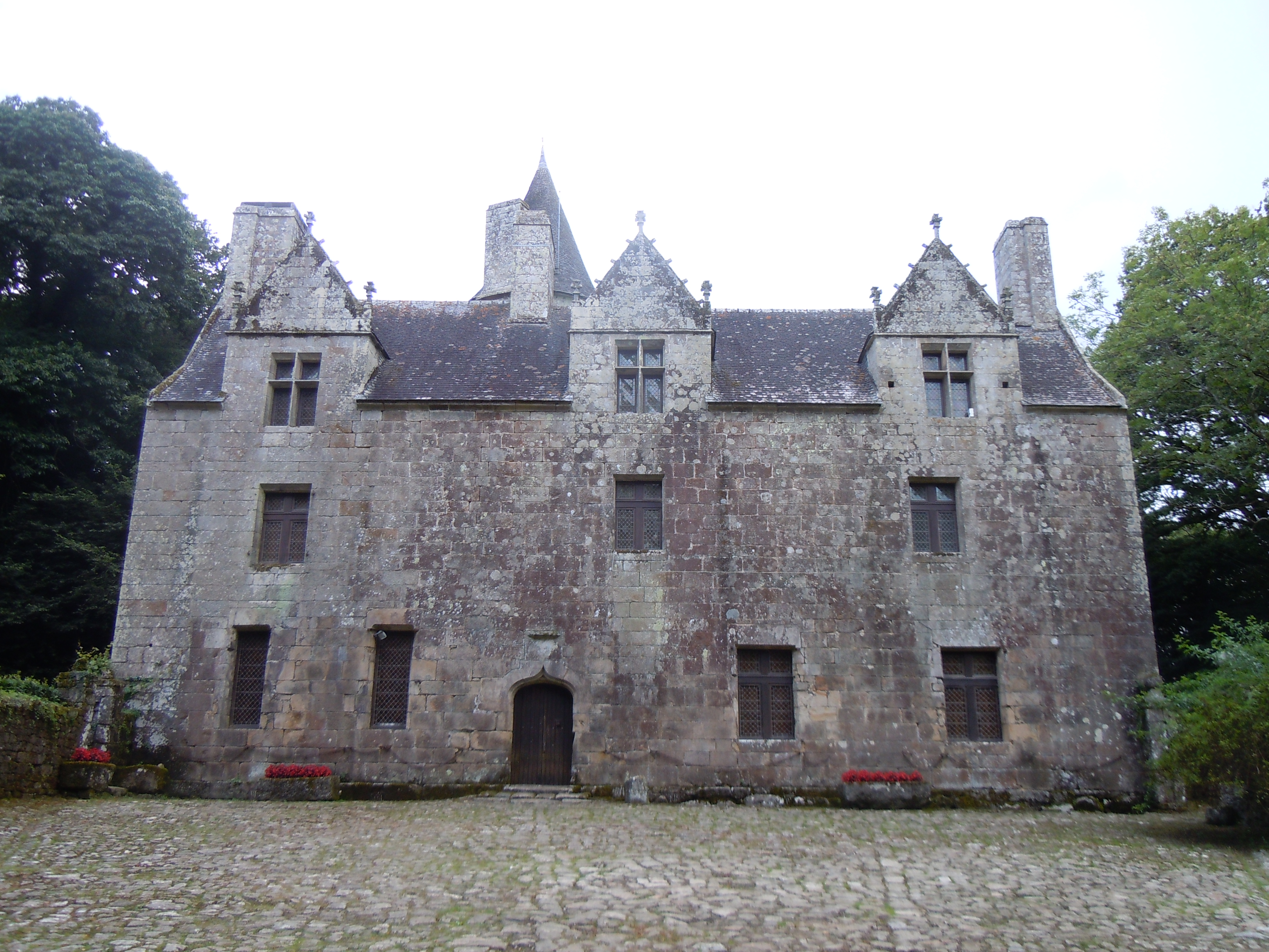 élévation est du château de Coatcouraval à Glomel (Côtes d'Armor)